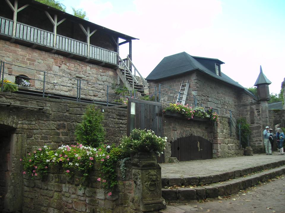 Landstuhl: Burg Nanstein, Innenhof